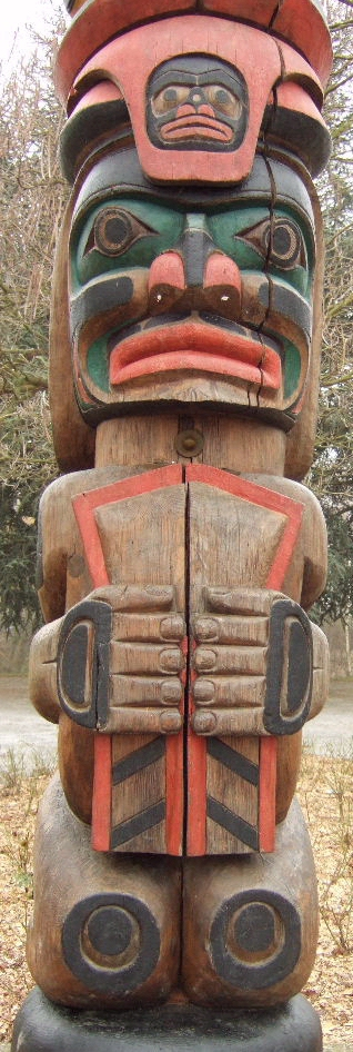 Wappenpfahl (Ausschnitt) von Chief Tony Hunt – Kwakiutl-Indianer aus Fort Rupert, British Columbia, KanadaGeschenk der kanadischen Regierung an die Stadt Bonn zur Bundesgartenschau 1979 1989, anlässlich der 2000-Jahr-Feier der Stadt Bonn renoviert von Chief Tony Hunt. 2004 restauriert. 2018 vollständige Restaurierung mit originalgetreuer Erneuerung besonders stark beschädigter Teile. Standort: Rheinaue Häuptling mit schildförmigem „Kupfer“